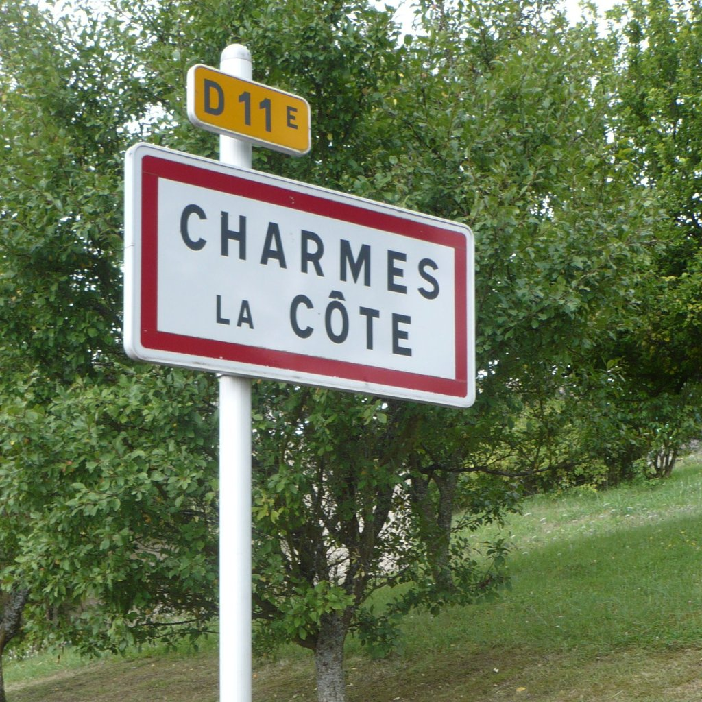 Le panneau d'agglomération du village de Charmes-la-Côte (54113, Meurthe-et-Moselle, Lorraine, France).